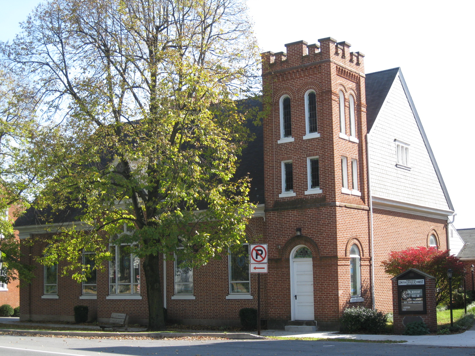 New Berlin, Pennsylvania